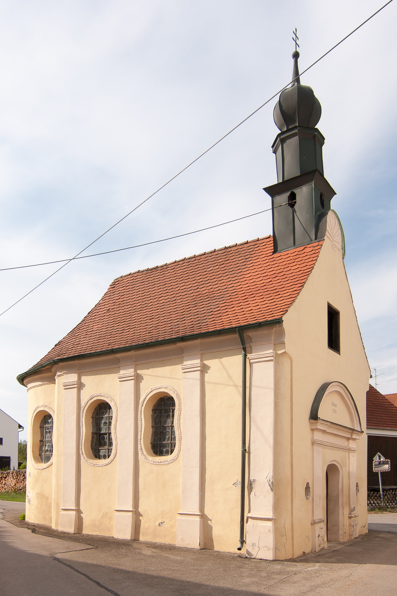 Kapelle; Mitte 18. Jahrhundert; mit Ausstattung.This is a photograph of an architectural monument.